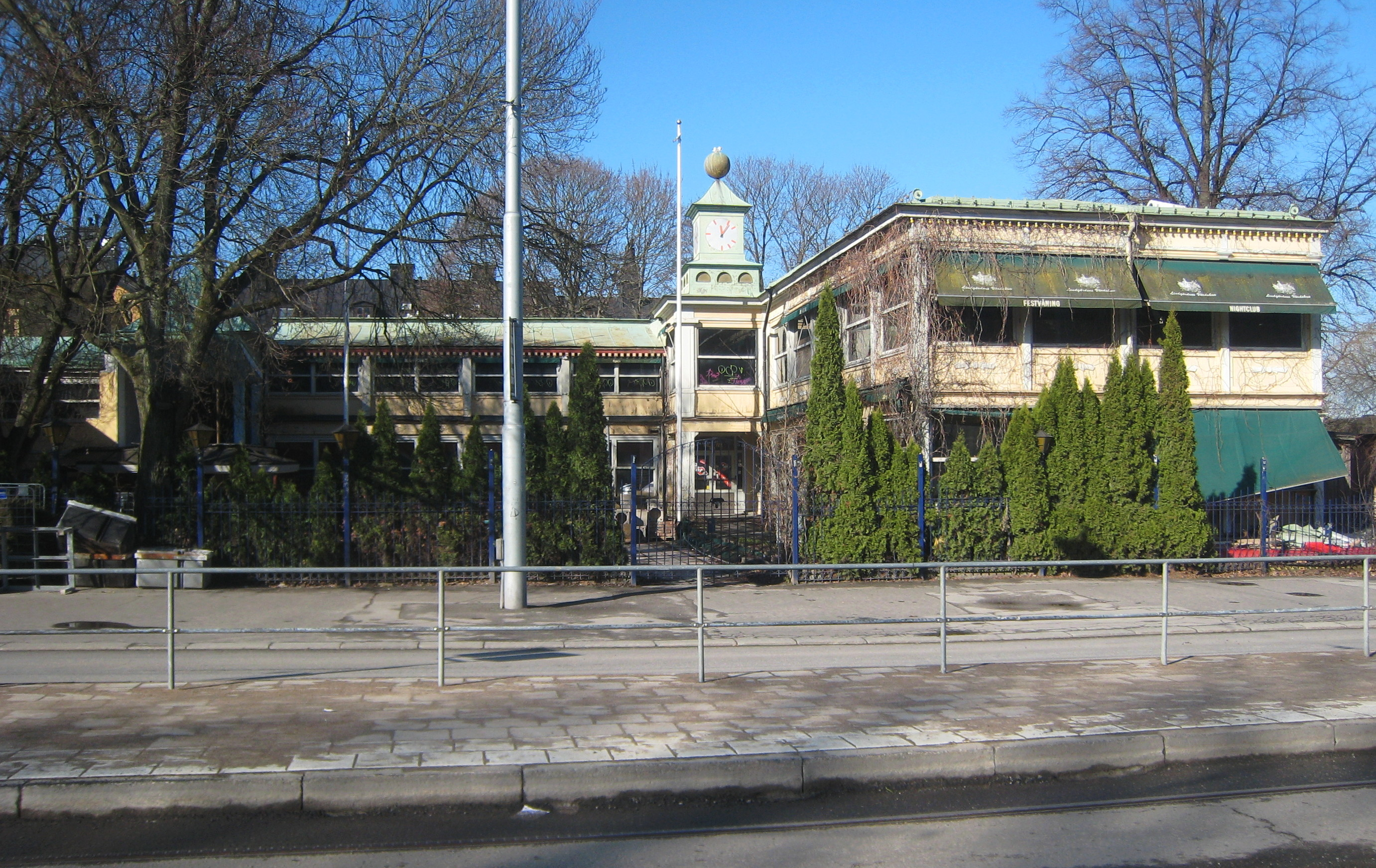 Lindgården